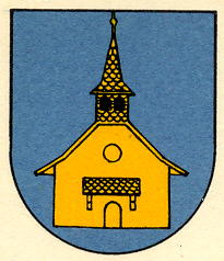 Wappen von Chappele Kanton Waadt Schweiz